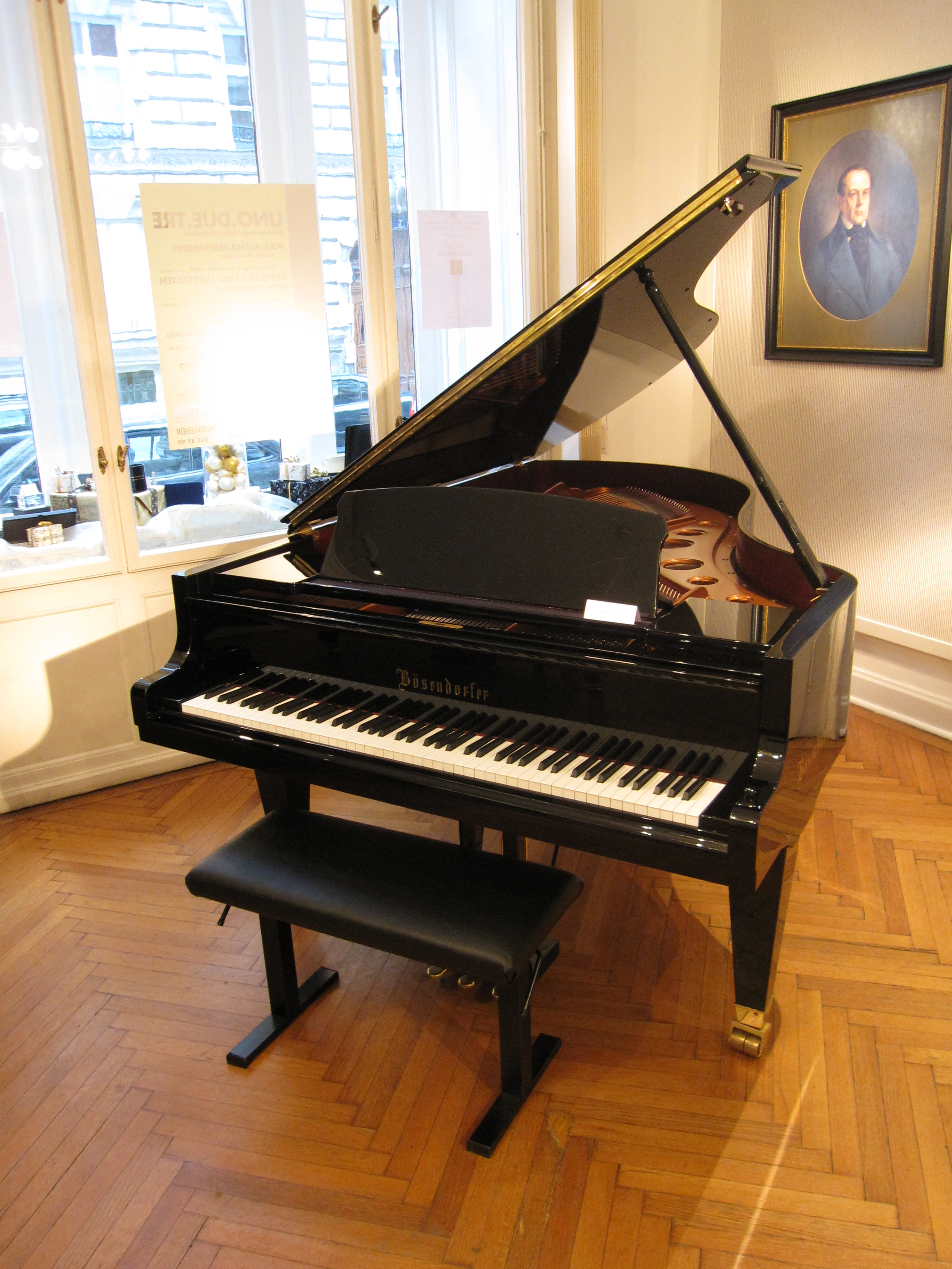 Bösendorfer Flügel Modell 214sp (schwarz poliert)